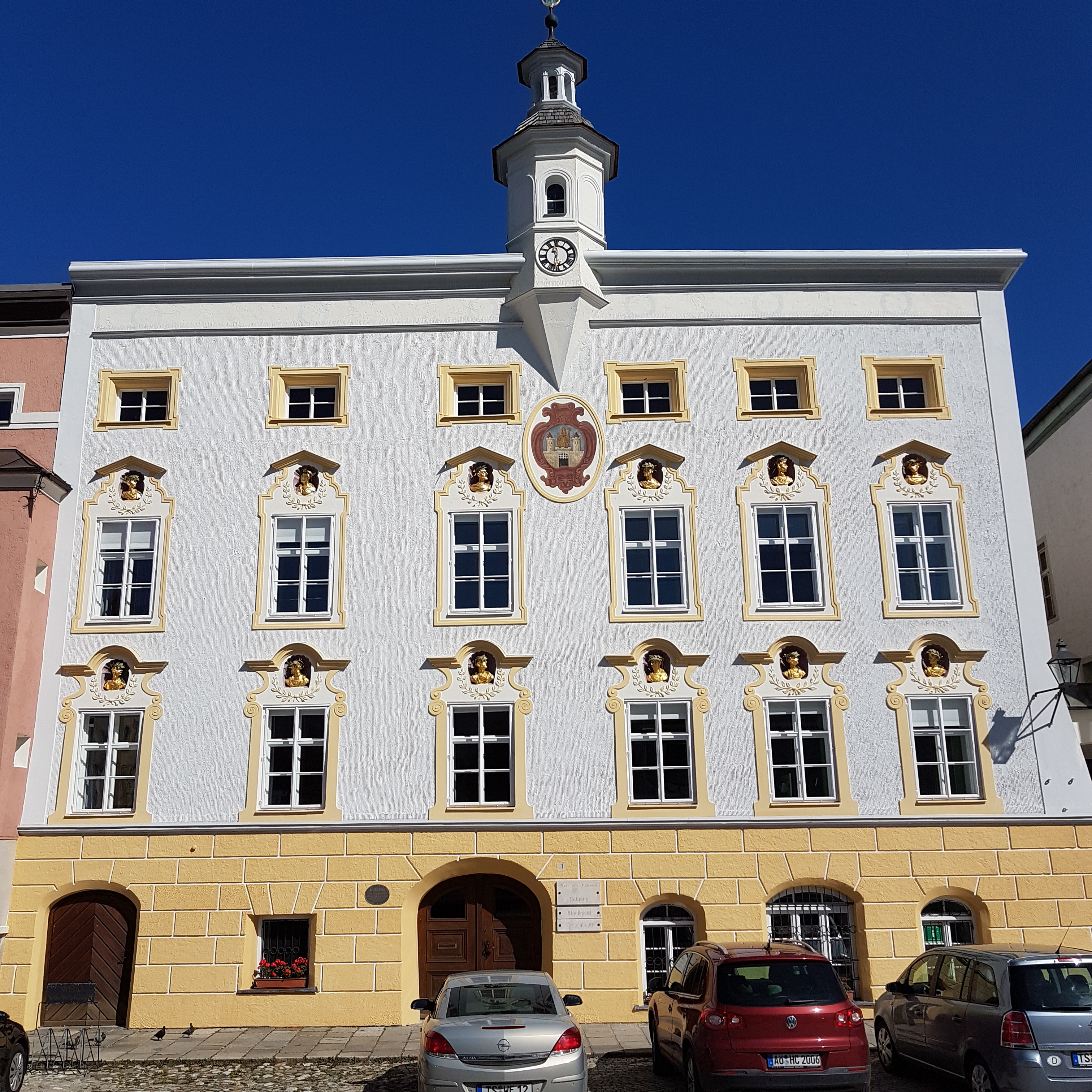 Tittmoning, Rathaus (erste Frontansicht)